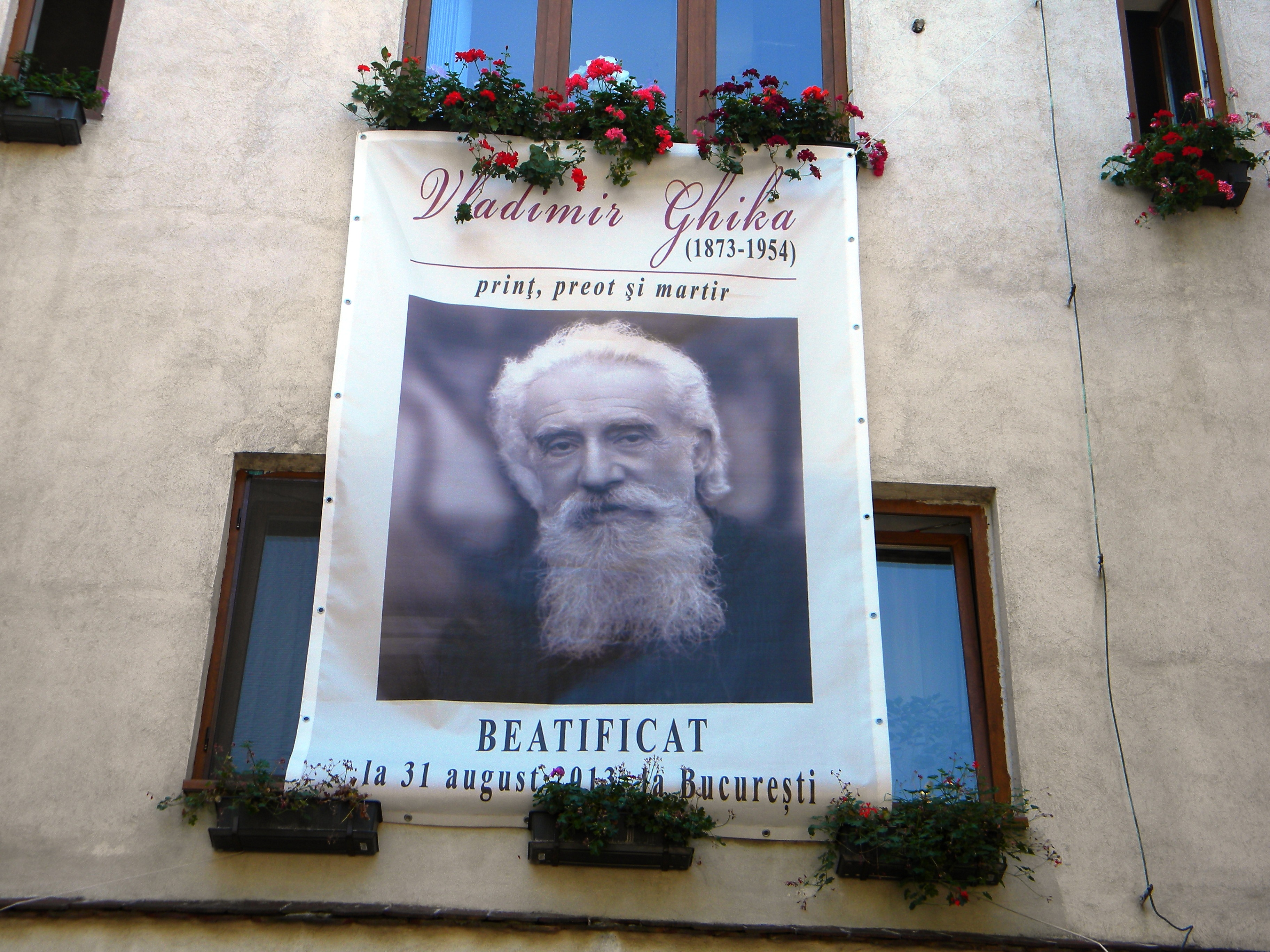 Bucuresti, Romania, Cimitirul Bellu Catolic (Imaginea Fericitului Vladimir Ghika) (3)